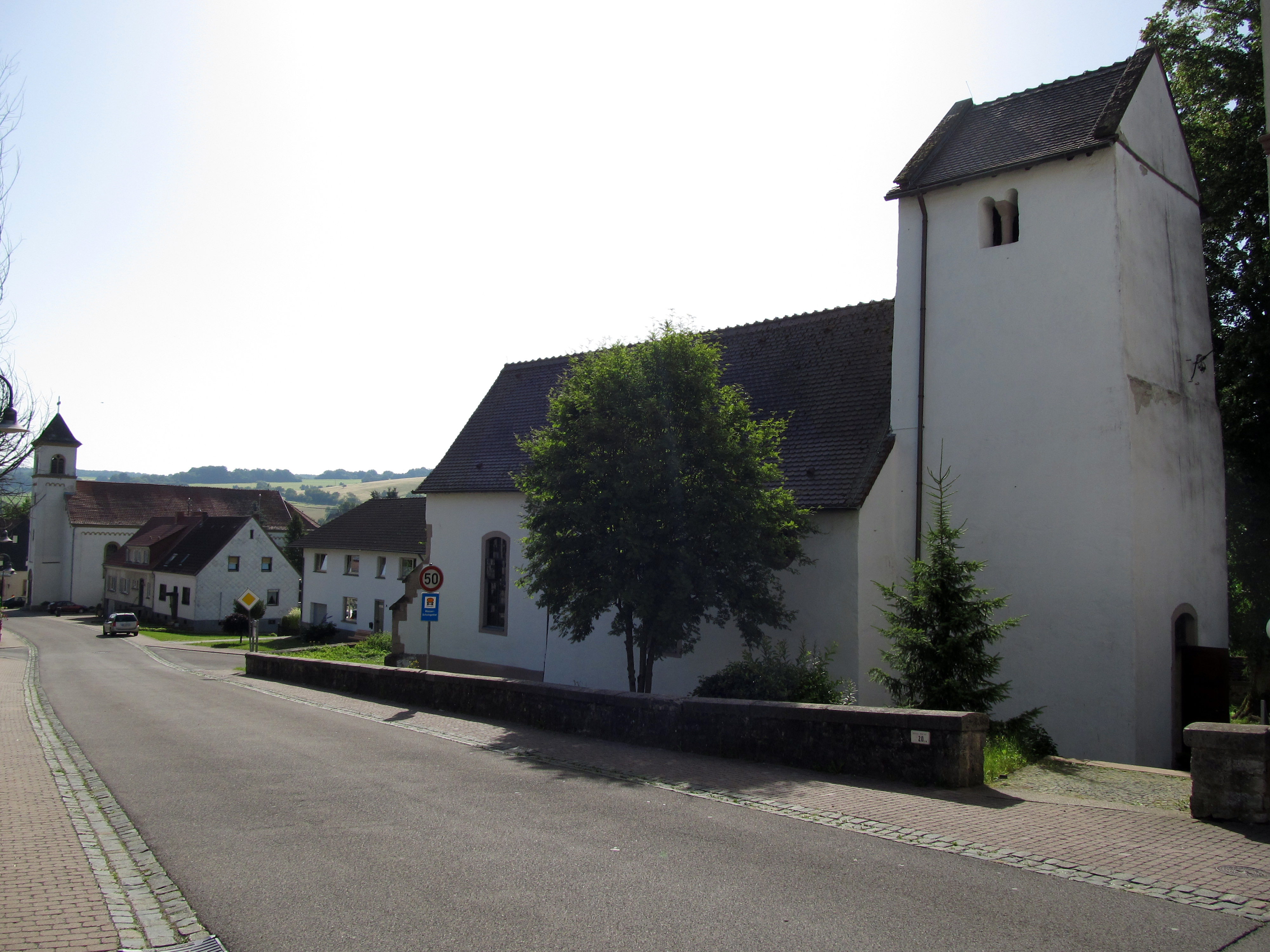 Die protestantische (vorne rechts) und die katholische (hinten links) Kirche von Walsheim, einem Ortsteil der Gemeinde Gersheim, Saarland